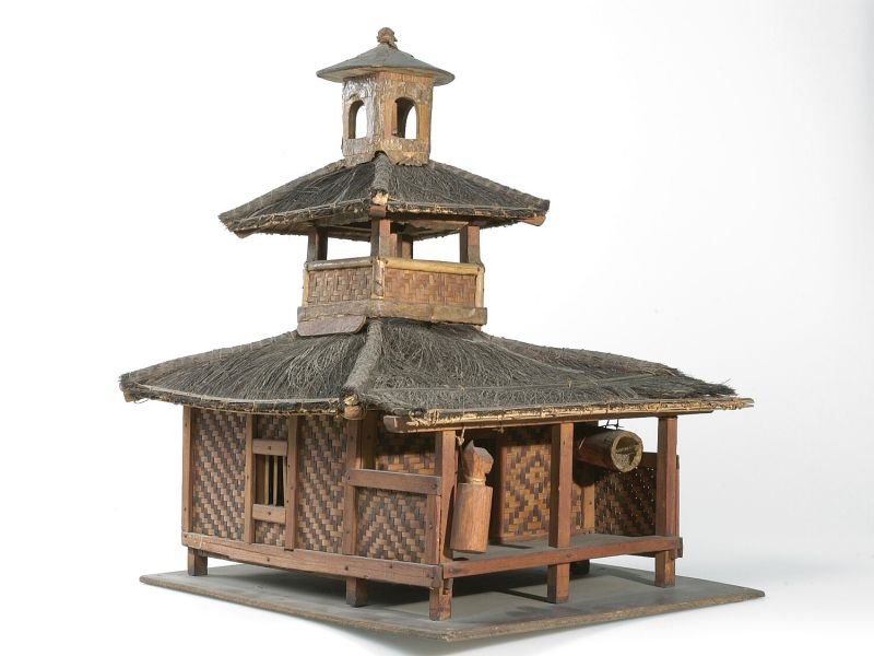 Model bangunan. Ini adalah model dari rumah ibadah muslim Sunda. Langgar adalah semacam bangunan kecil untuk beribadah. Bangunan ini bukan masjid karena tidak memiliki mihrab (sudut tempat imam yang mengarah ke Makkah. Dalam model ini terdapat beduk, tabuh (kentongan), dan pemukulnya.